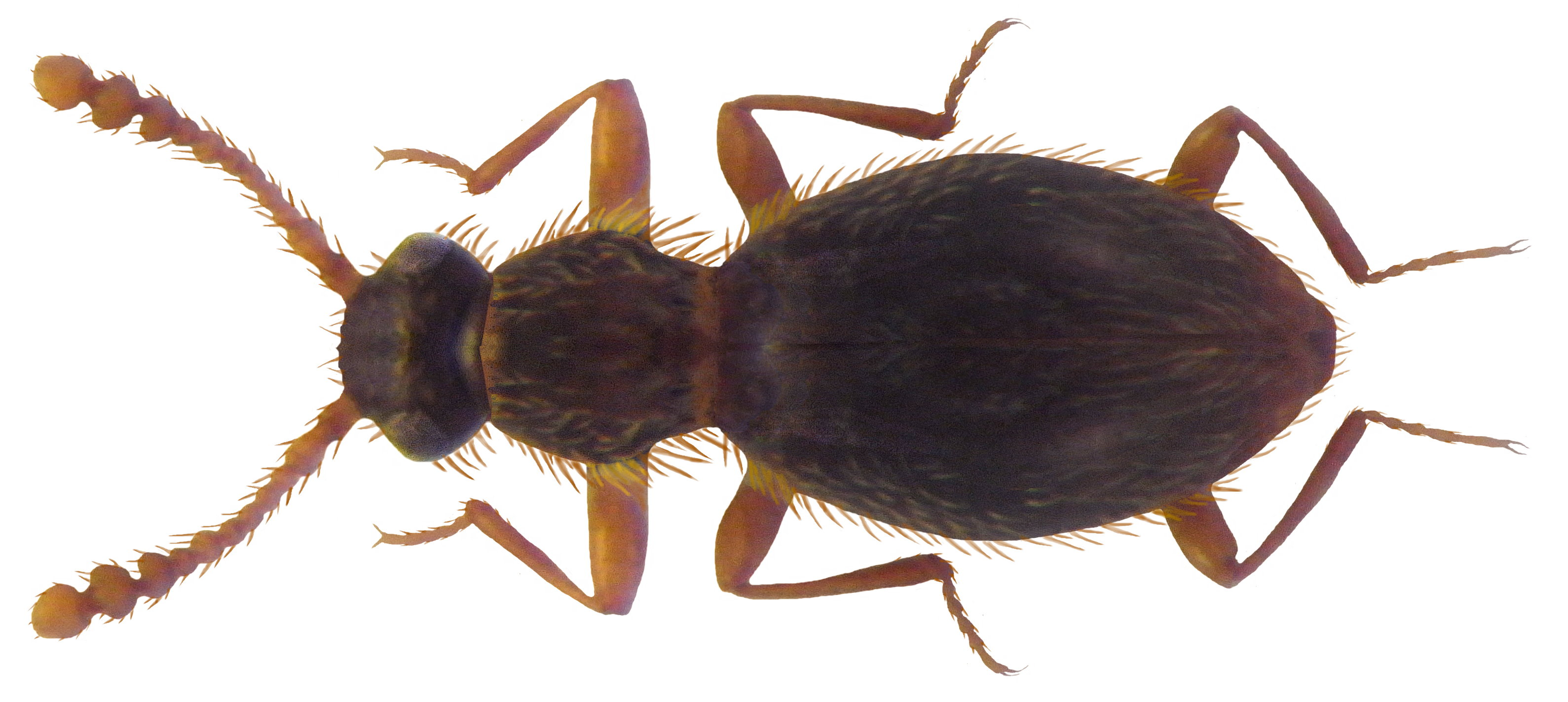 Familie: Scydmaenidae Groesse: 0,9 mm Verbreitung: Europa Ökologie: terricol im Humus der Wälder Fundort: Germania, Thüringen, Berka, Hainich leg. A.Weigel, 1998; det. Meybohm, 1998 Photo: U.Schmidt, 2009